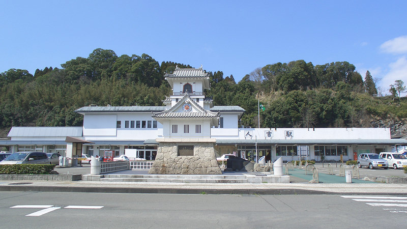 JR肥薩線人吉駅 駅舎